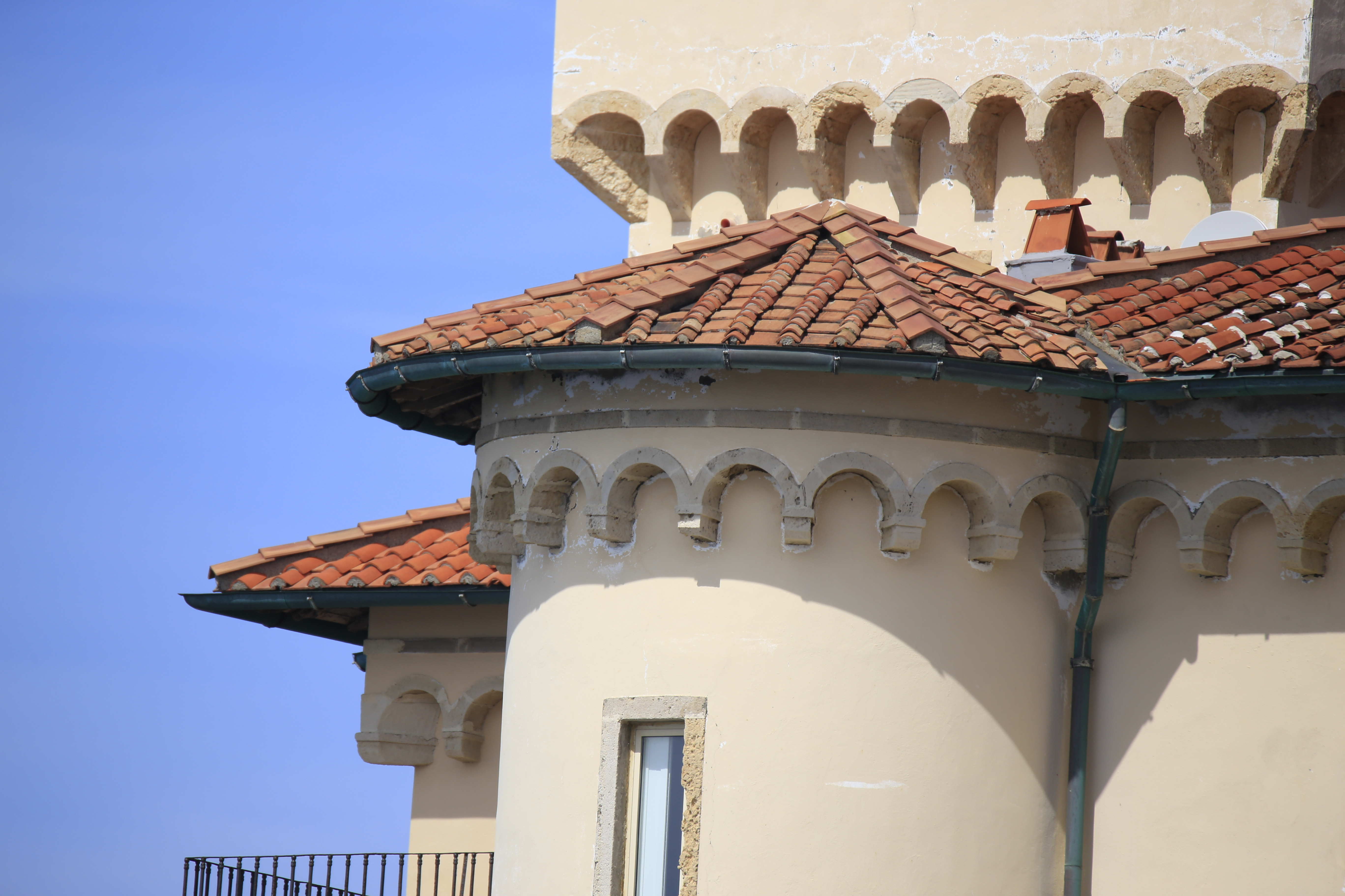 Castel Boccale